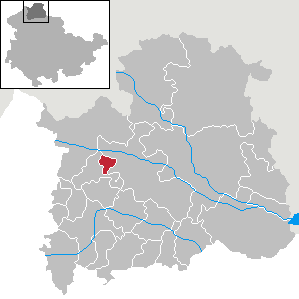 Gemeinde Etzelsrode in Thüringen, Landkreis Nordhausen